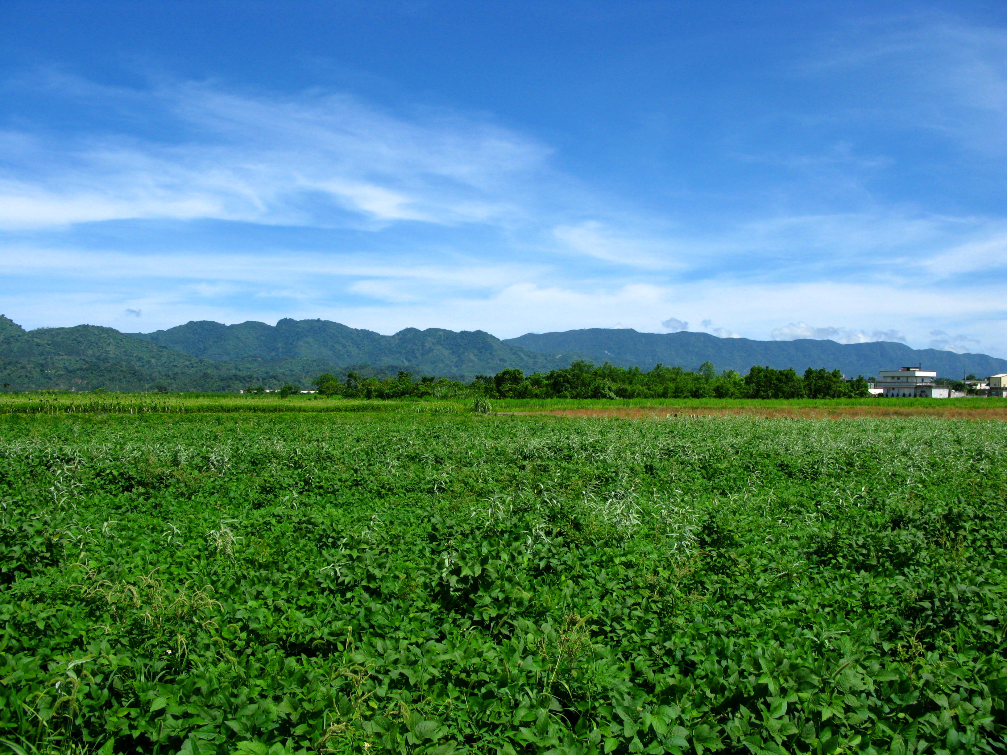 Haian Range, Taiwan